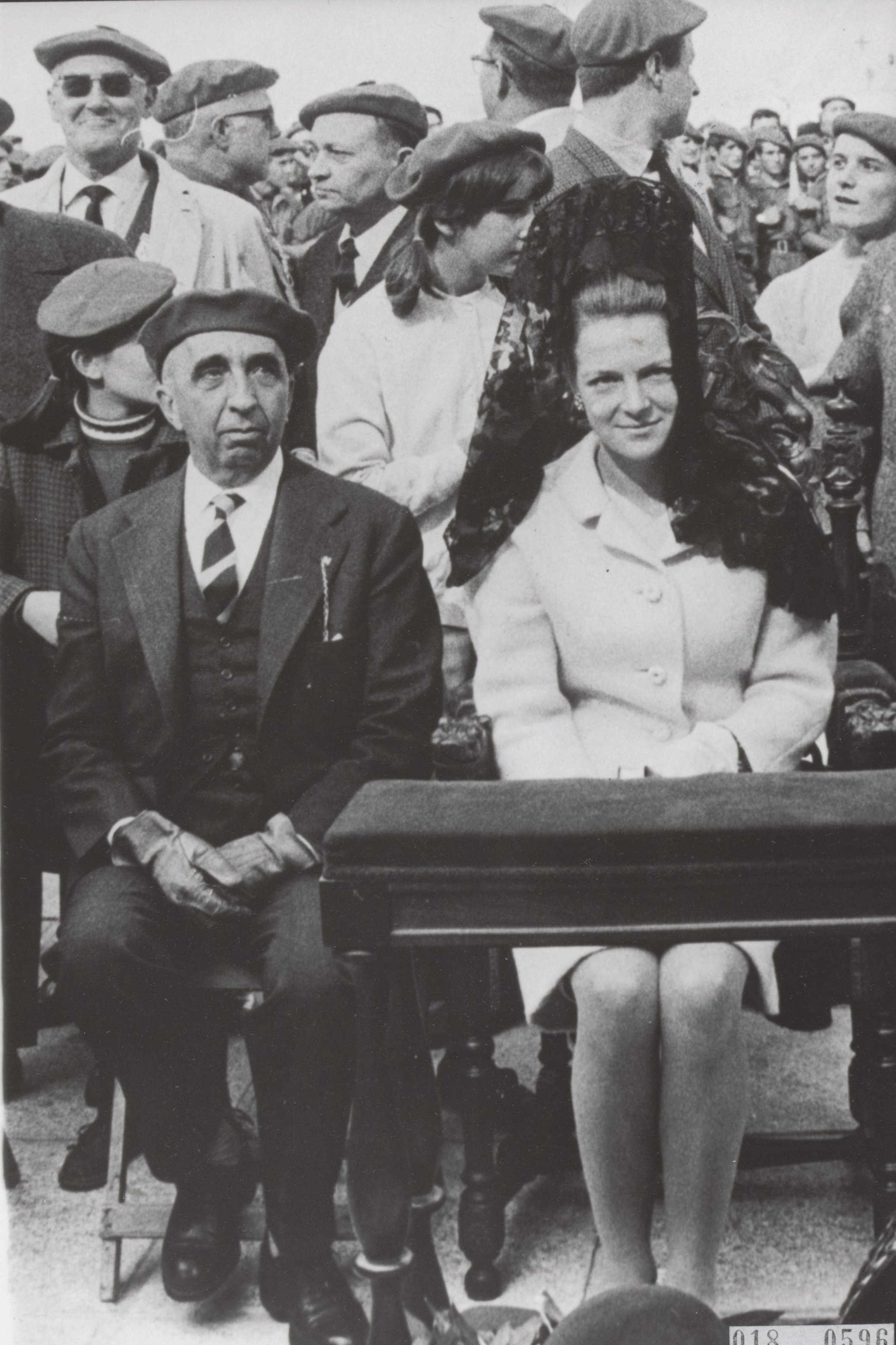 La princesa Irene en un encuentro carlista en el Cerro de los Angeles, Madrid